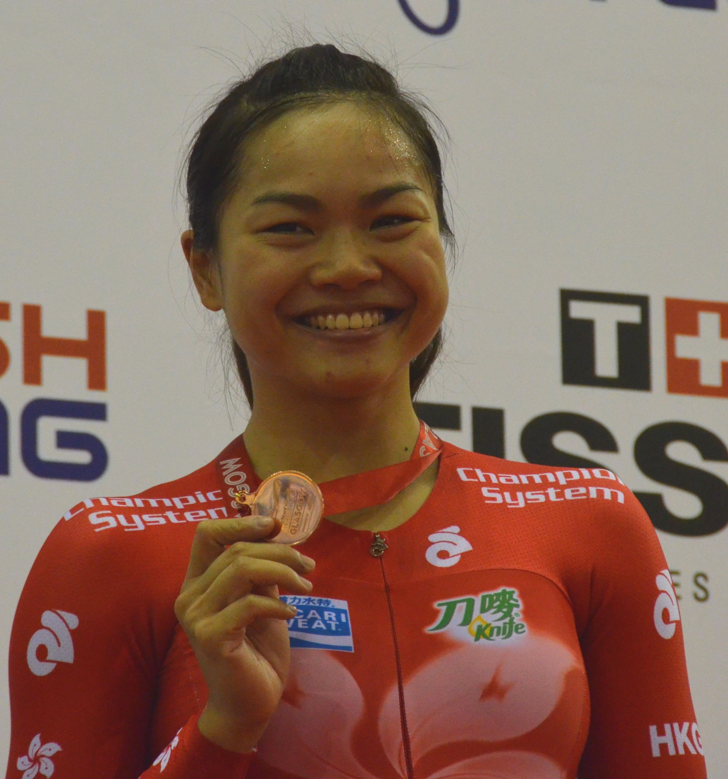 Lee Wai Sze, Radsportlerin aus Hongkong